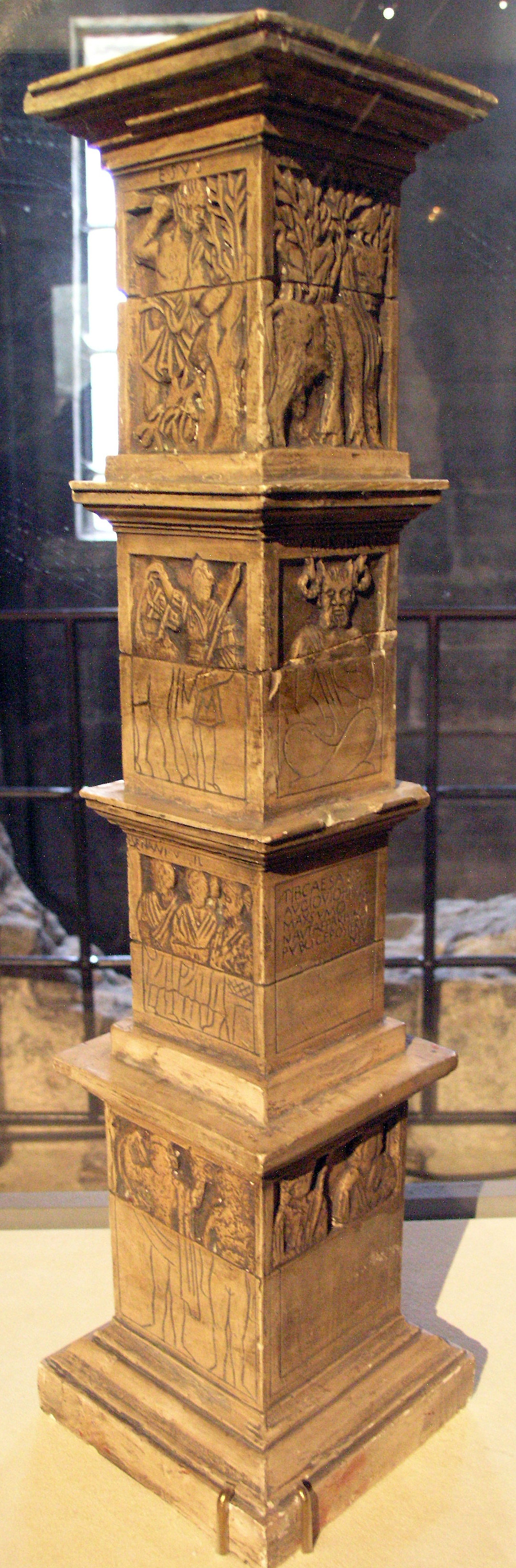 Maquette du Piliers des Nautes